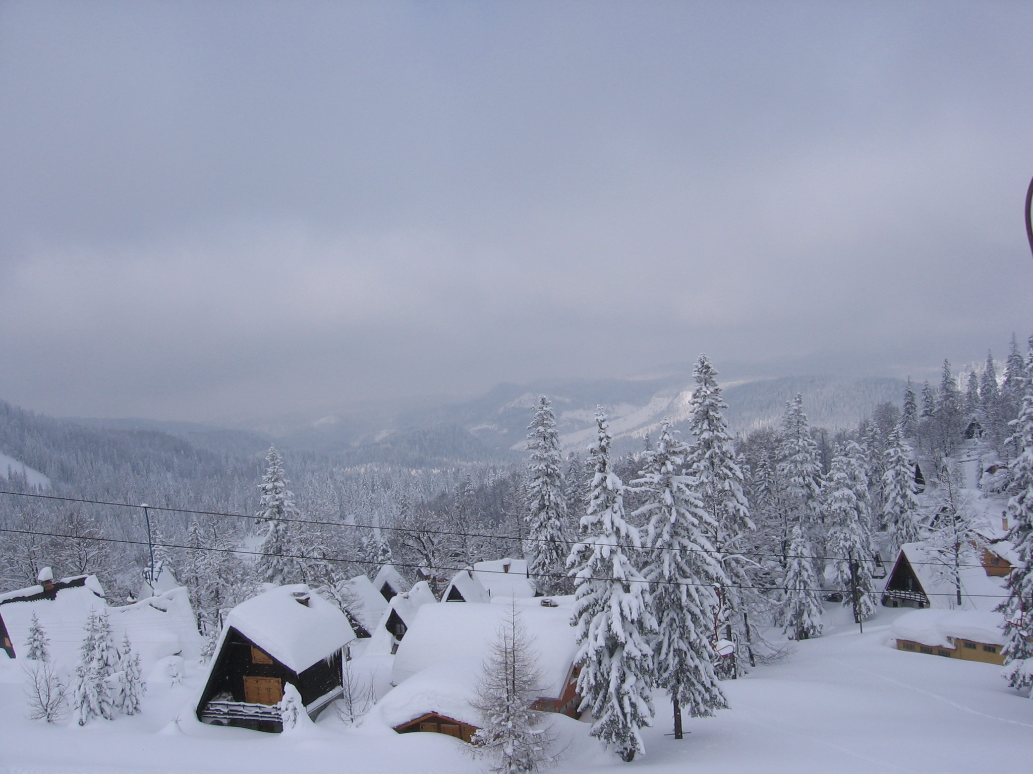 Аутор: ВулеМ